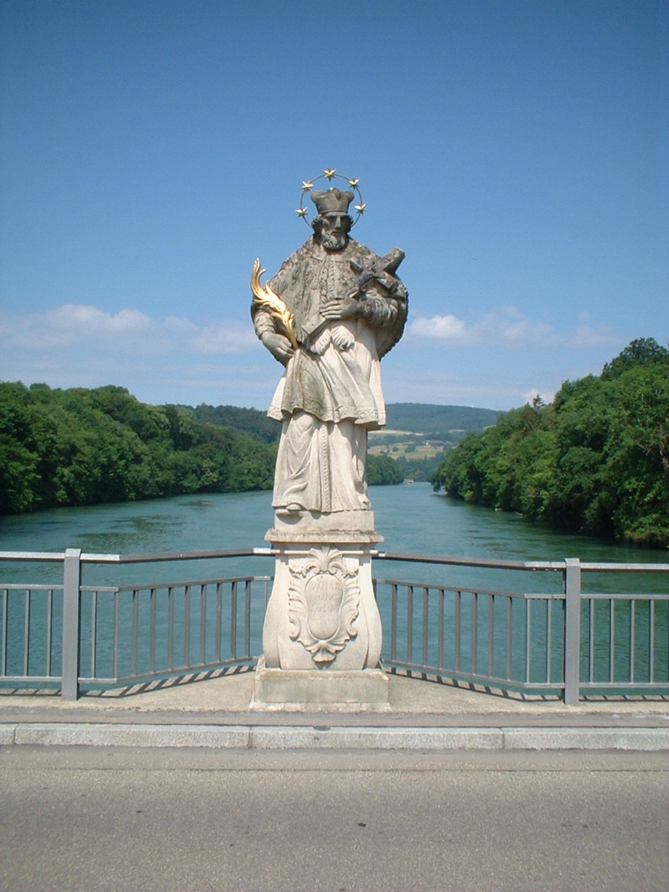 Franz Ludwig Wind (1719-1789): Statue des Heiligen Nepomuk auf der Rheinbrücke zwischen Kaiserstuhl (Aargau) und Hohentengen (Baden)